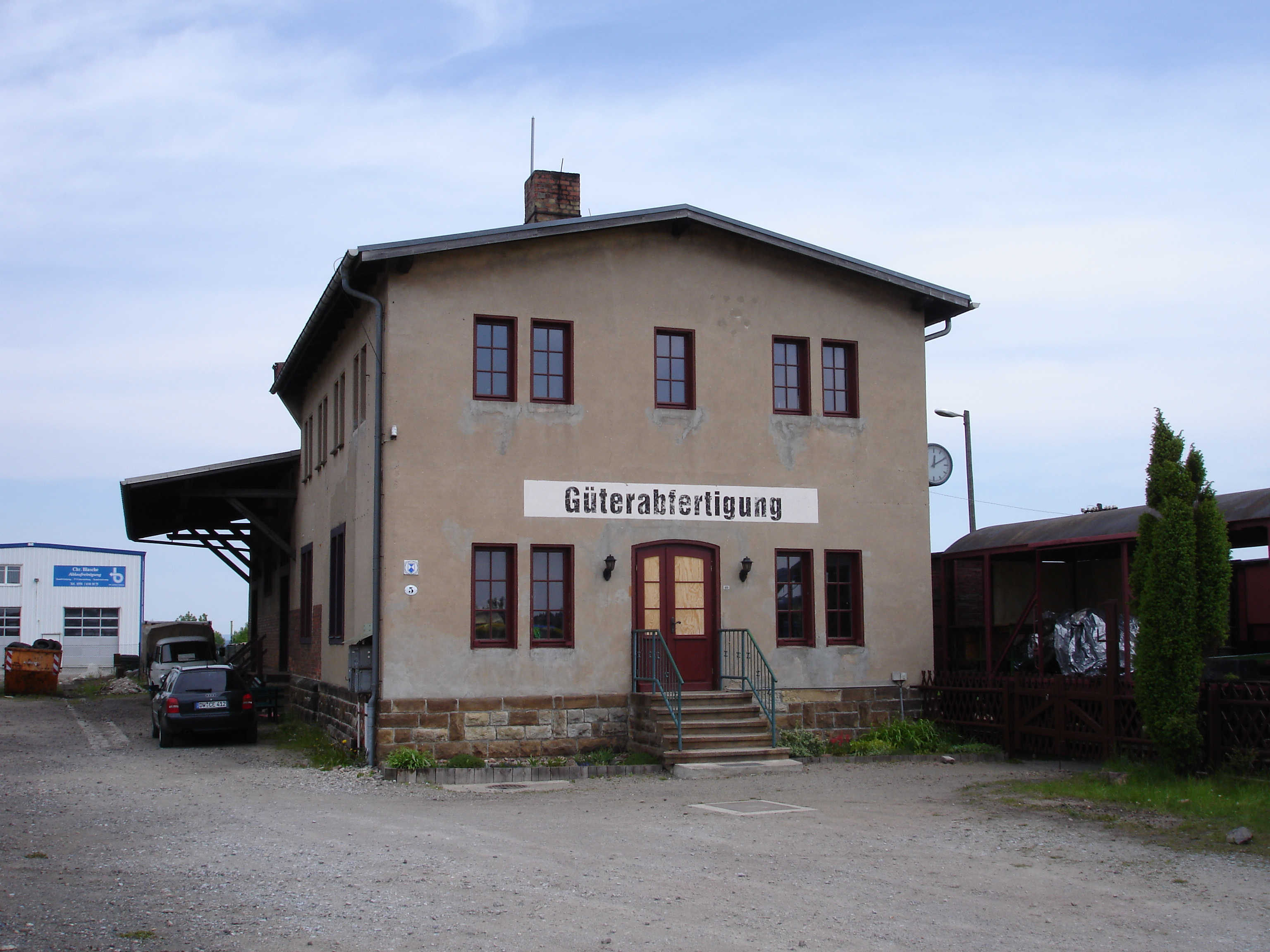 Güterboden im Bahnhof Dresden-Gittersee (Museumsbahn Windbergbahn)